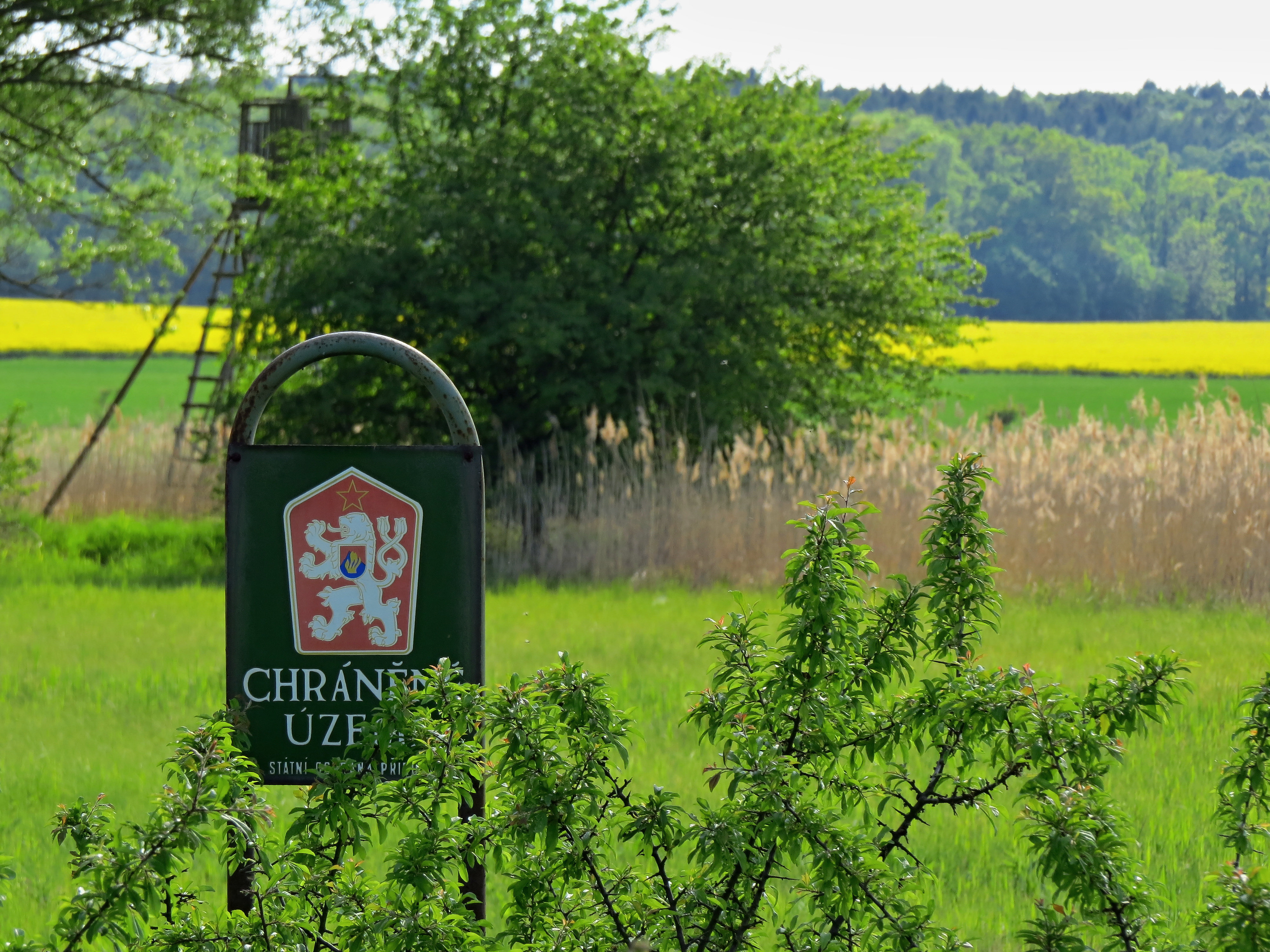 Project: Chráněná území